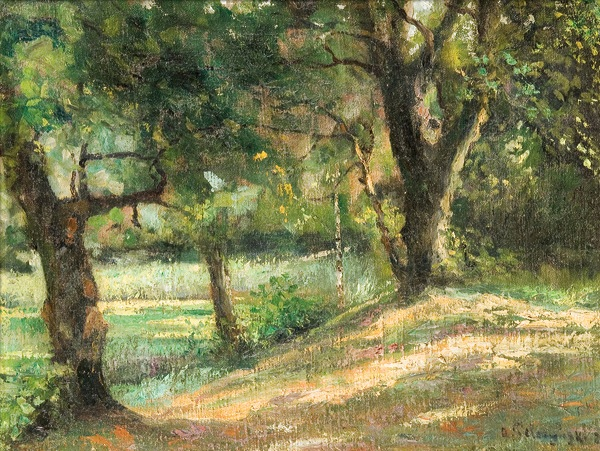 W parku